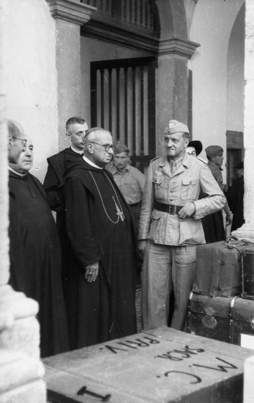 Information added by Wikimedia users.Abbazia di Montecassino, Italia, 1943. Il vescovo Gregorio Vito Diamare, abate dell'abbazia di Montecassino (a sinistra, con al croce pettorale) supervisiona l'imballaggio di opere d'arte dell'abbazia pronte ad essere trasferite verso luoghi più sicuri. Il trasferimento fu organizzato dal tenente colonnello tedesco Julius Schlegel (un cattolico di Vienna), della Divisione "Hermann Göring" (a destra, in divisa da campagna). Montecassino Abbey, Italy, 1943. Bishop Gregorio Vito Diamare, Abbot of Montecassino Abbey (left, with Pectoral Cross) supervises the packing of artworks from the Abbey about to be transferred to more secure places. The transfer was organized by the German Oberstleutnant (Lieutenant Colonel) Julius Schlegel (a roman catholic from Wien), Division "Hermann Göring" (right, in field uniform).